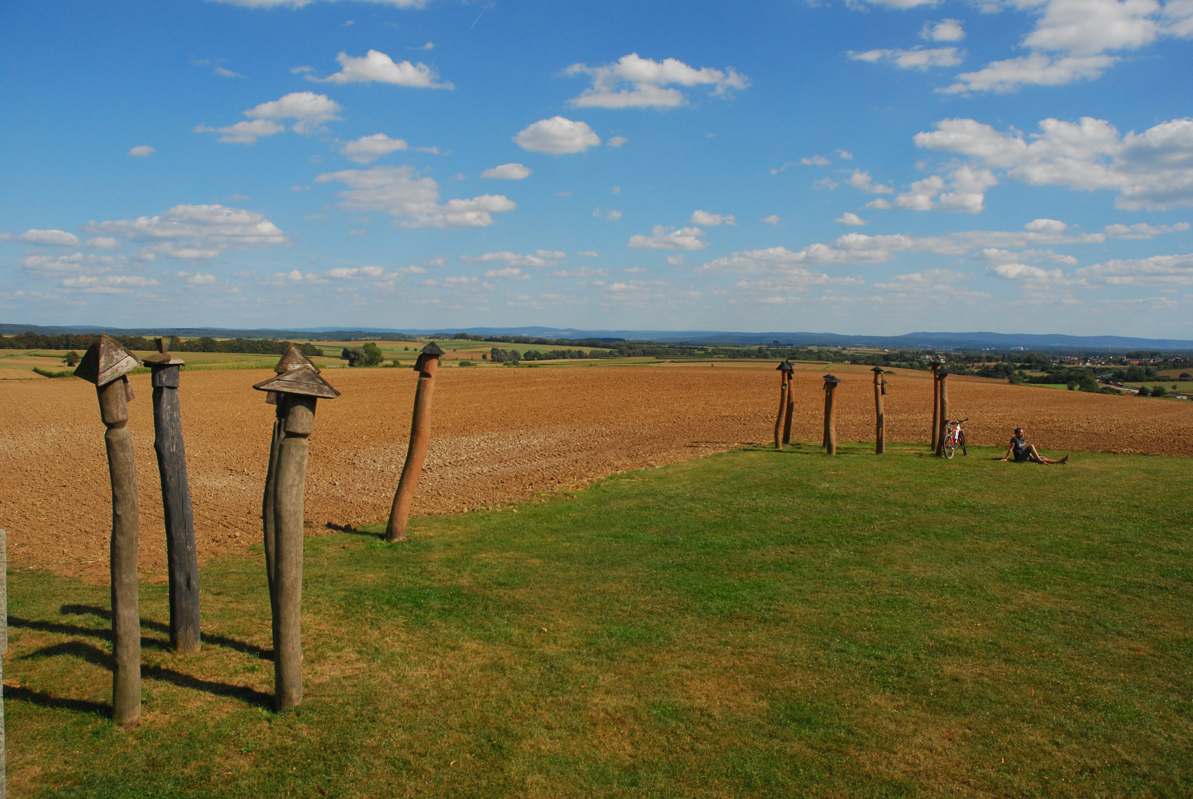 Stelen am Wartbaum bei Nidderau-Windecken Richtung Spessart